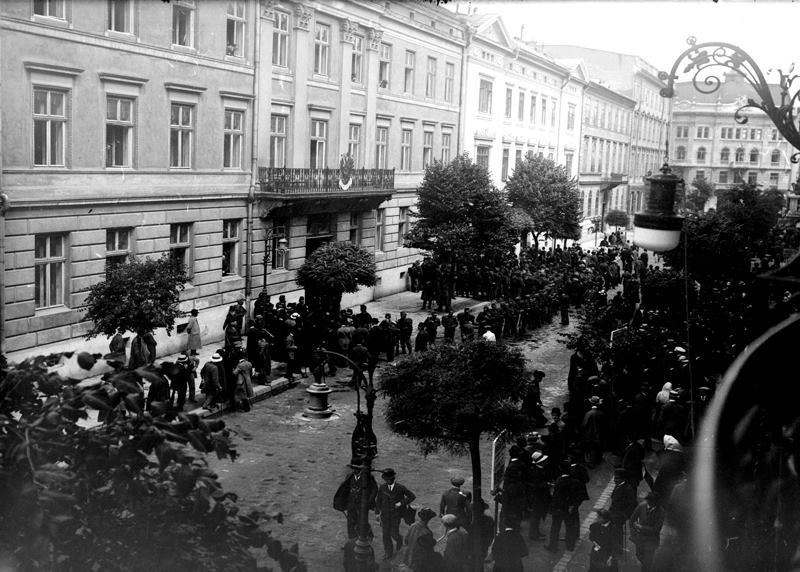 Львів, Будинок Львівського Староства, вул. Третього Травня 8 (сьогоднішня вул.Січових Стрільців 8)